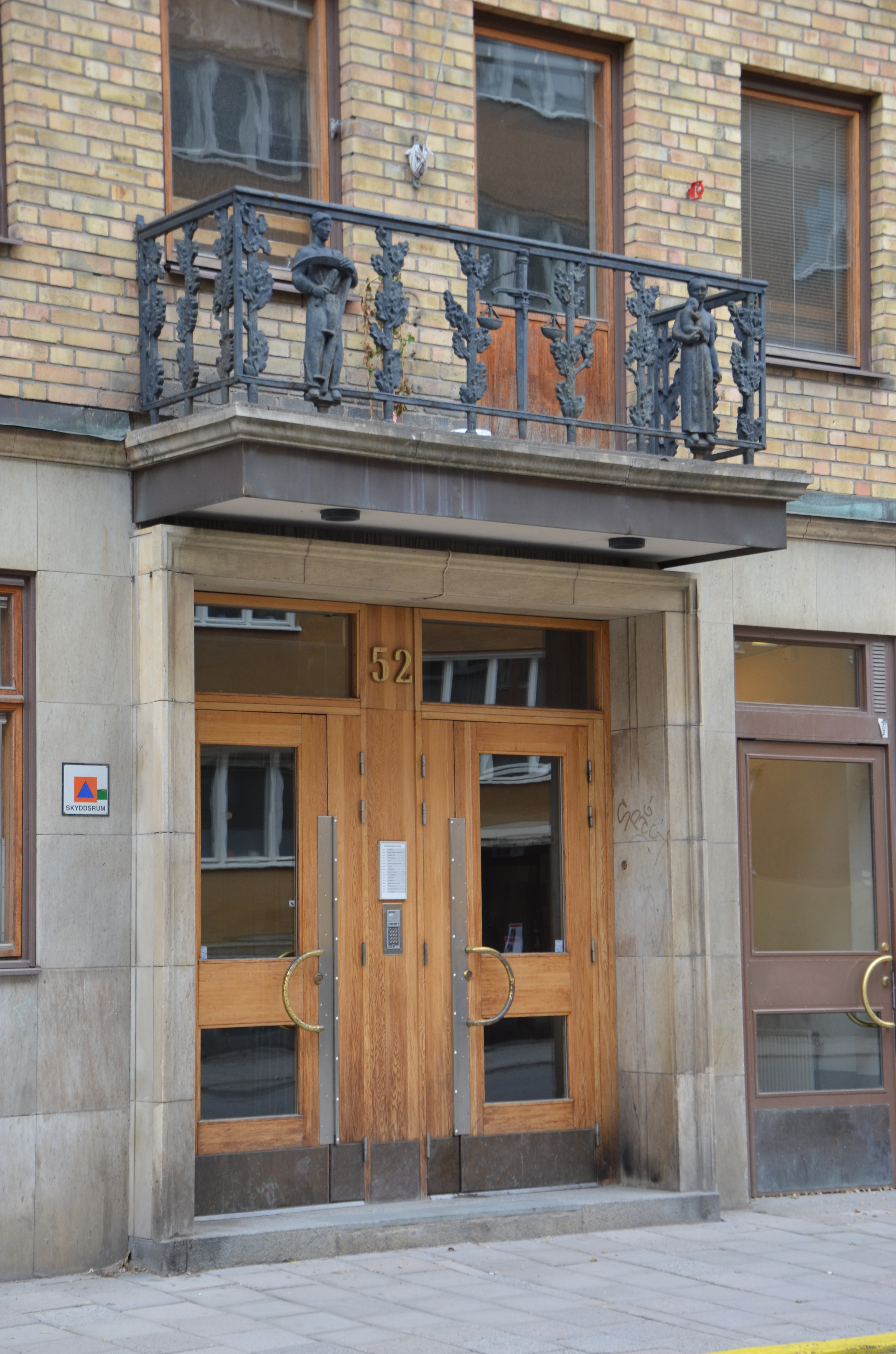 Skulpterat balkongräcke i järnsmide på fastigheten Nederland Mindre /, Högbergsgatan 52. Huset byggt 1941-43 efter ritningar av K J Karlström.